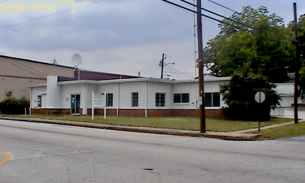 Old Villa Rica Library